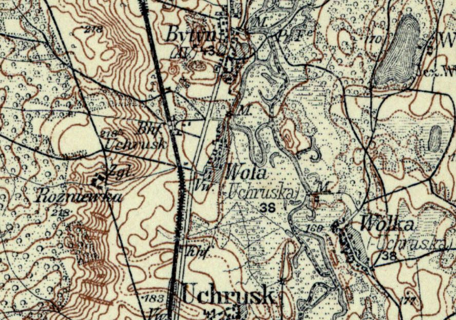 Wola Uhruska (pow. włodawski) na mapie Rosji Zachodniej (Karte des westlichen Rußlands) z 1915 r.